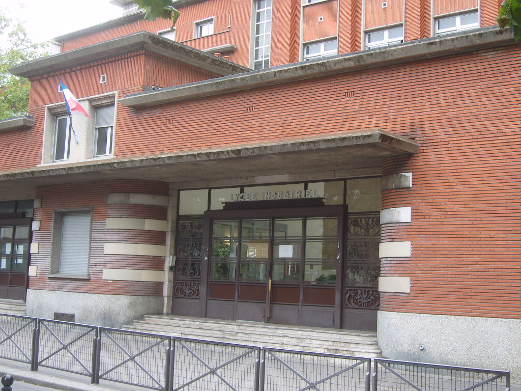 Paris 13e arrondissement, rue Tagore, lycée Gaston-Bachelard